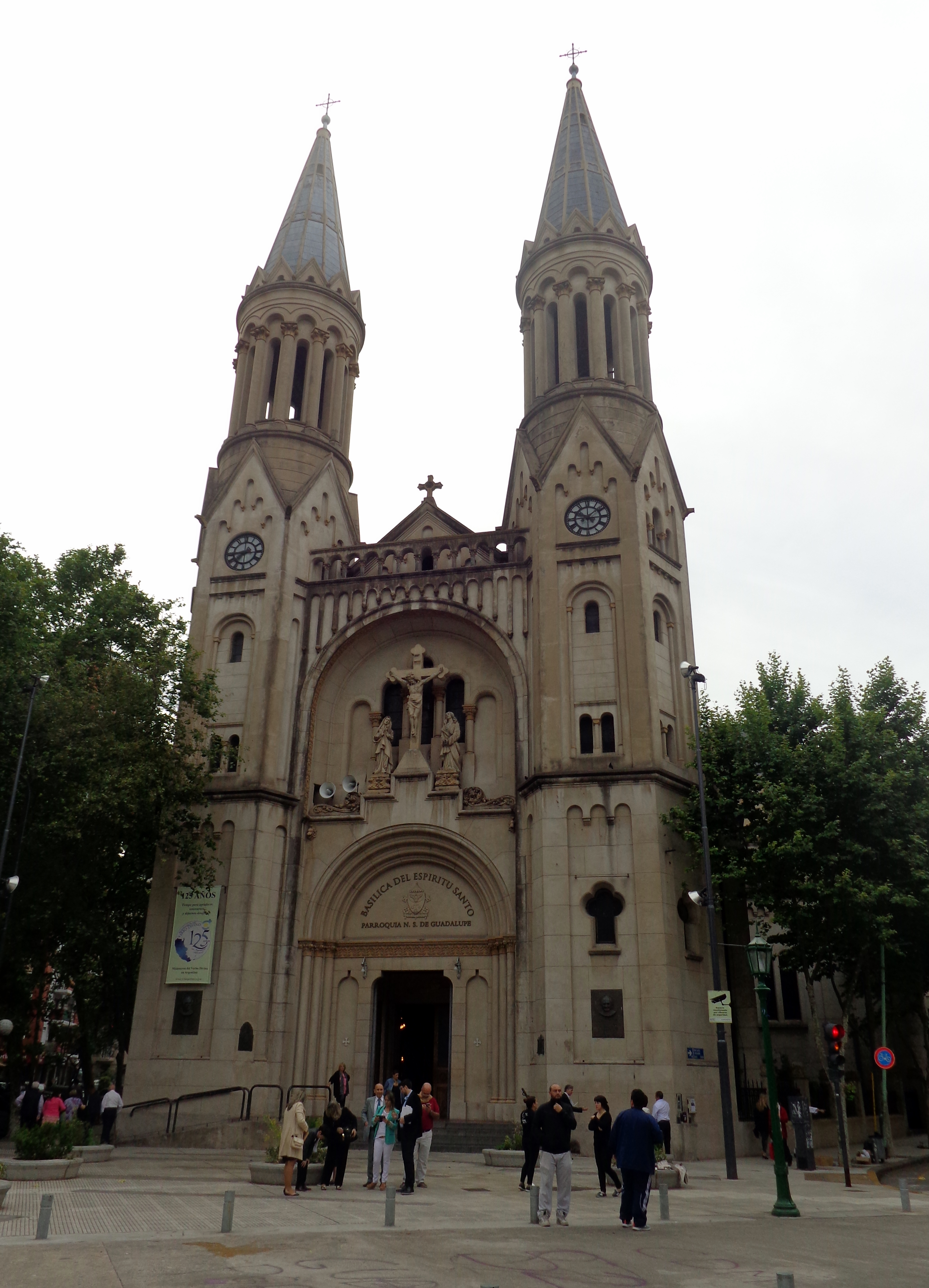 Basílica del Espíritu Santo, templo de la Parroquia de Nuestra Señora de Guadalupe, Buenos Aires, diseñada por el arquitecto Juan Beckeert, a principios del siglo XX.